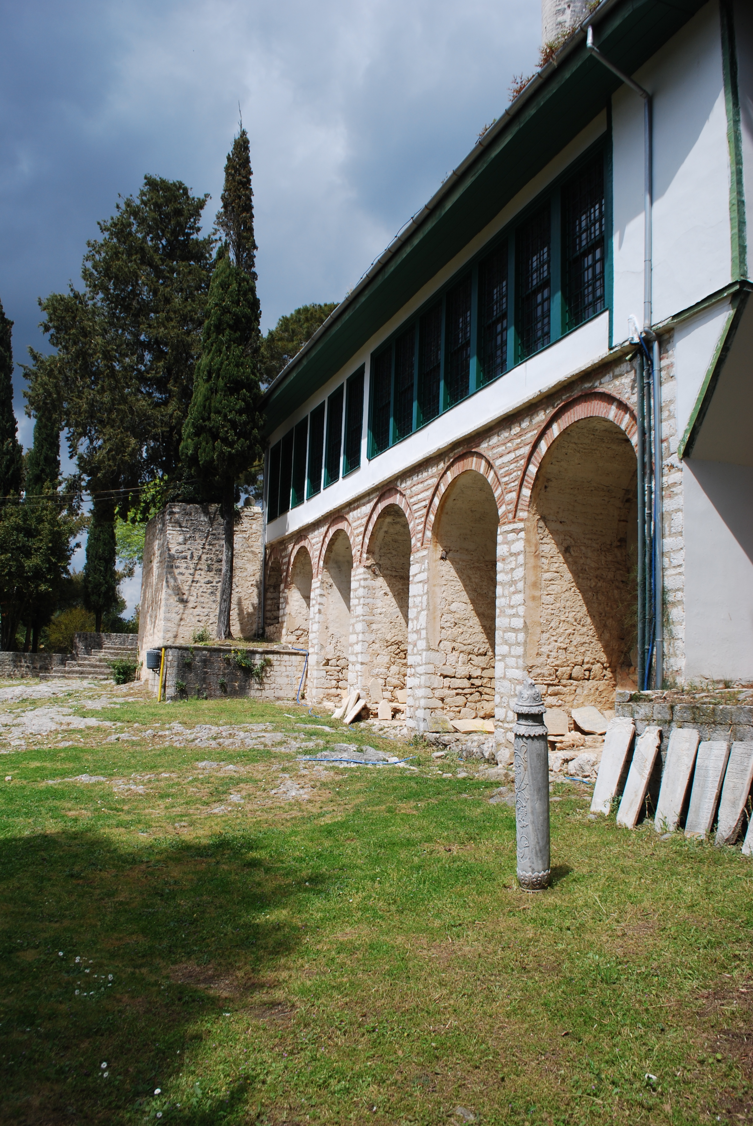 Vue de Ioannina.